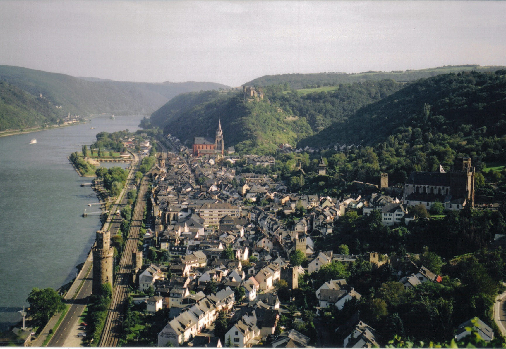 Oberwesel Stadtansicht